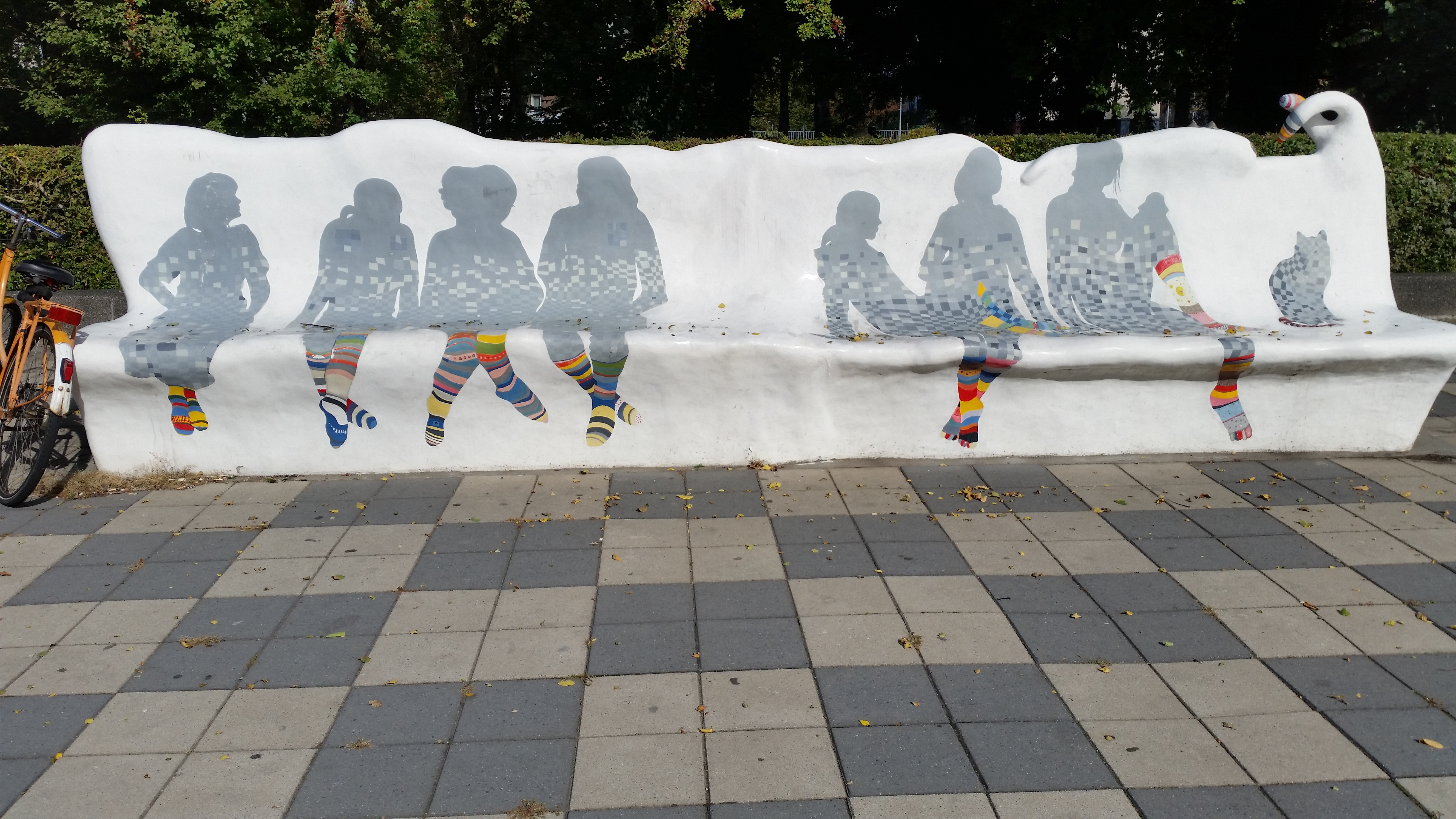 Zitbank van onder andere Hoshyar Rasheed in het Gerbrandypark